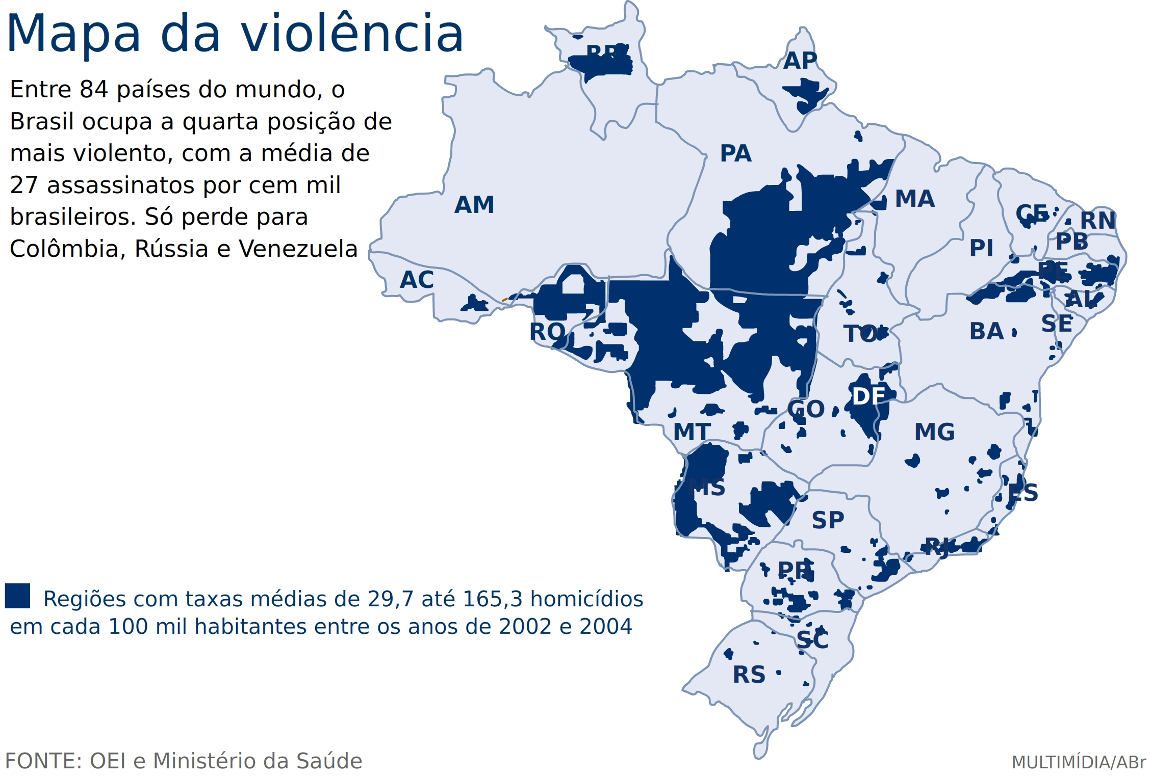 Mapa que mostra área ocupadas por municípios com taxa de homicídios (por cem mil habitantes) acima da média nacional do Brasil.